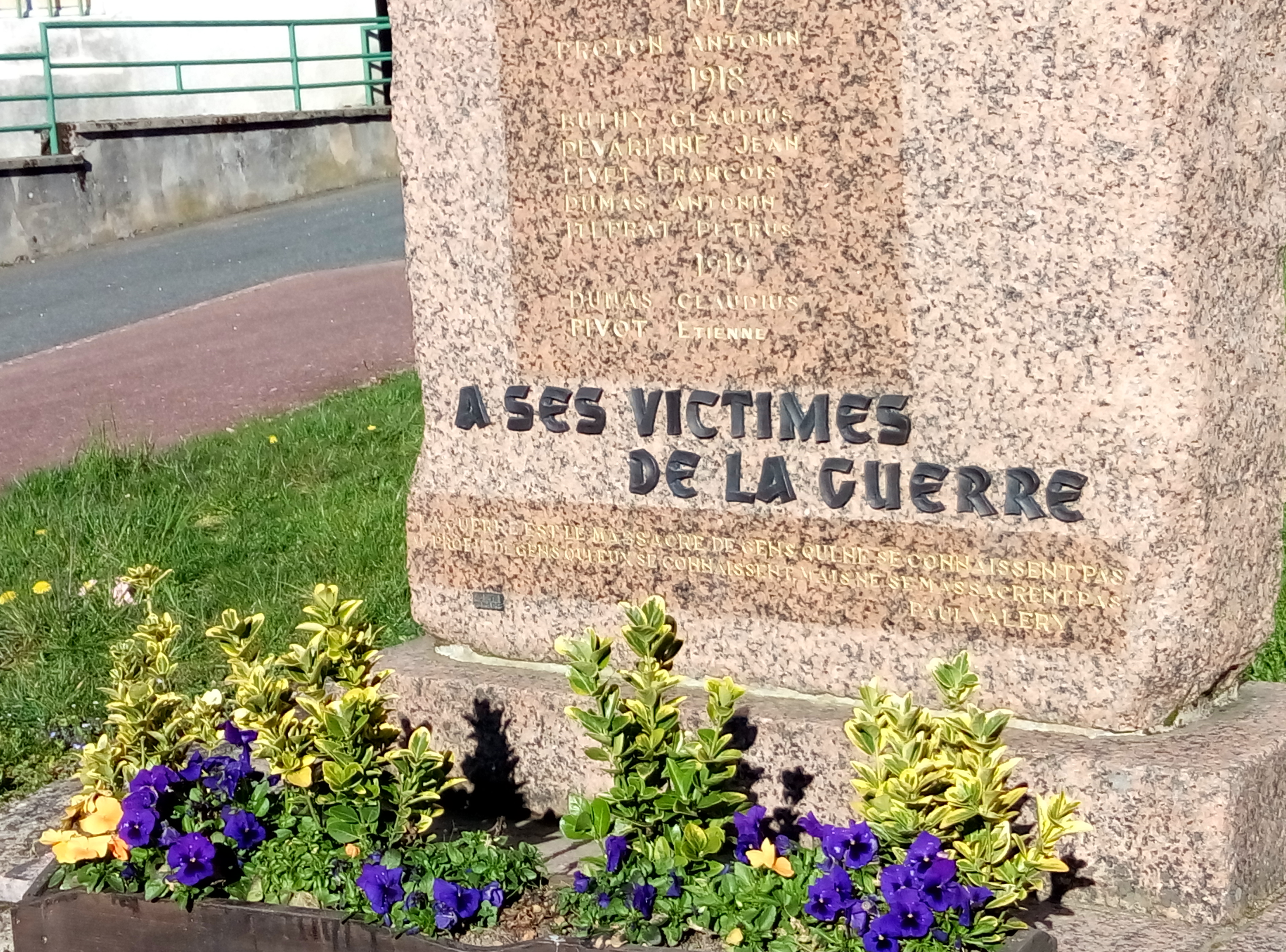 Monument aux morts pacifiste de Saint-Appolinnaire, dans le département du Rhône, sur lequel il est inscrit "La guerre est le massacre de gens qui ne se connaissent pas au profit de gens qui eux se connaissent mais ne se massacrent pas" de Paul Valéry